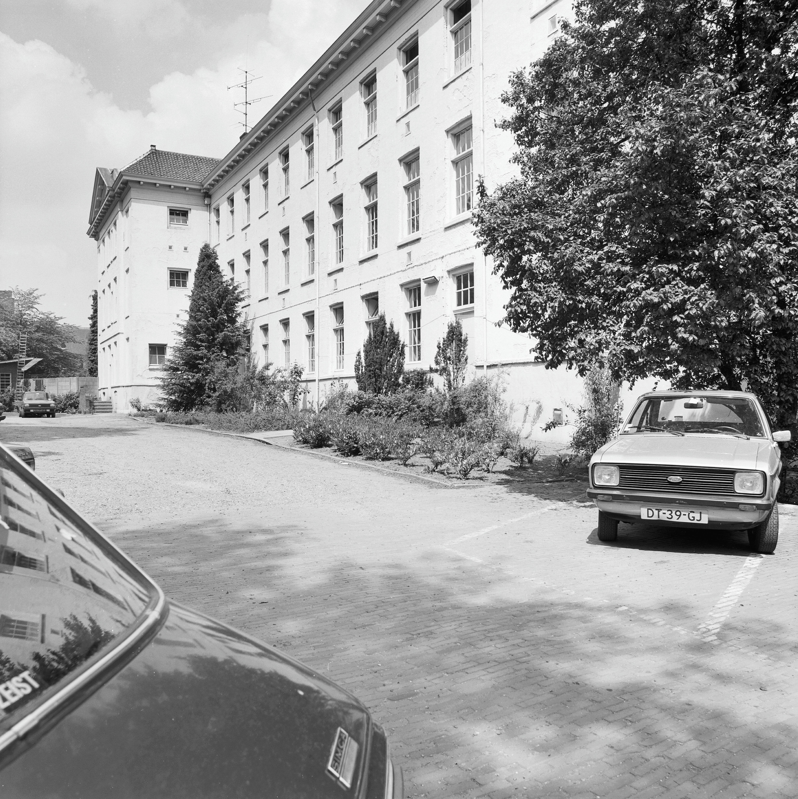 Duitse Huis: aanzicht op de westgevel van bouwdeel 1